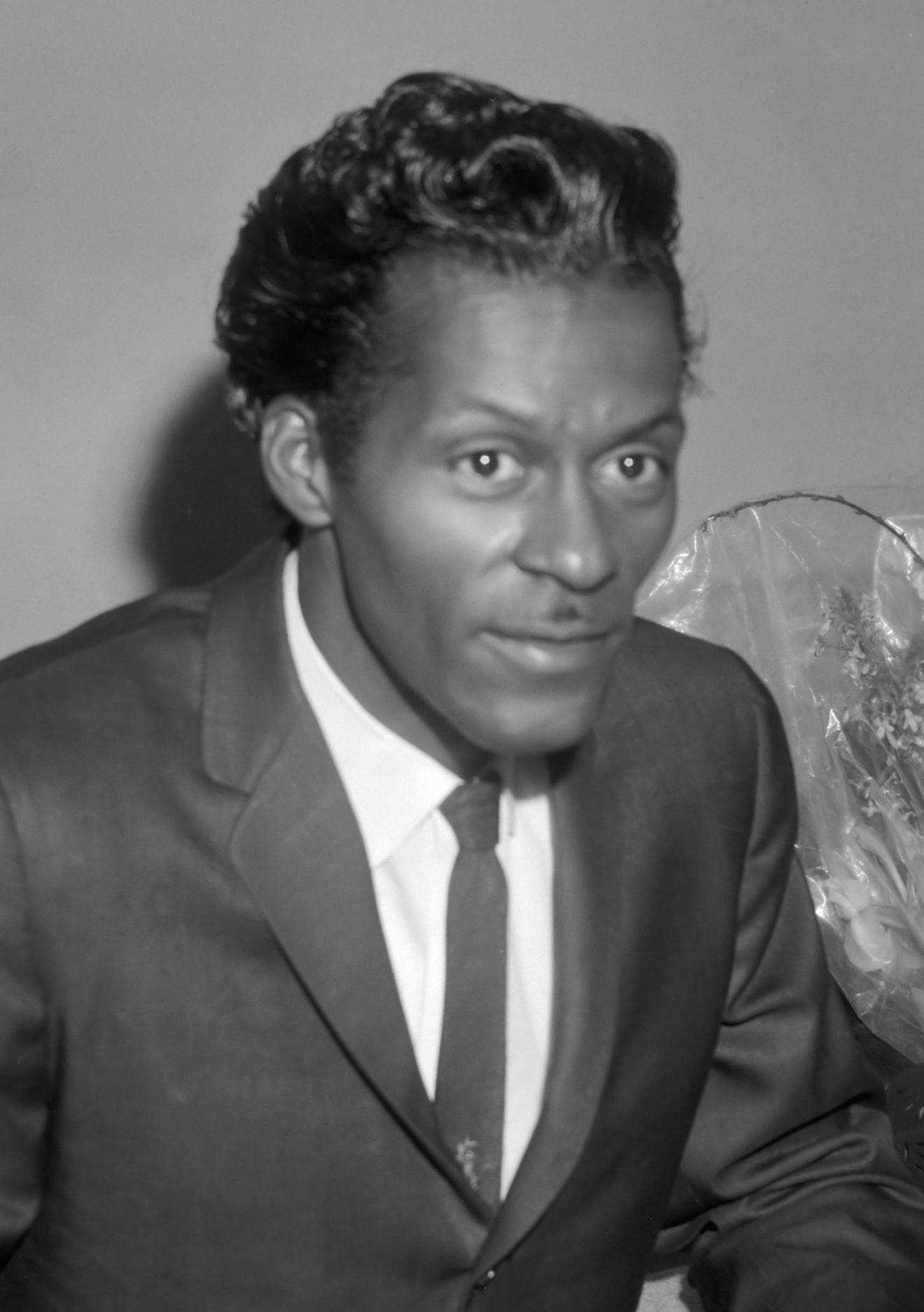 Aankomst Chuck Berry (zanger) op Schiphol, Chuck Berry en zijn zus Lucy Ann tijdens persconferentie 3 februari 1965